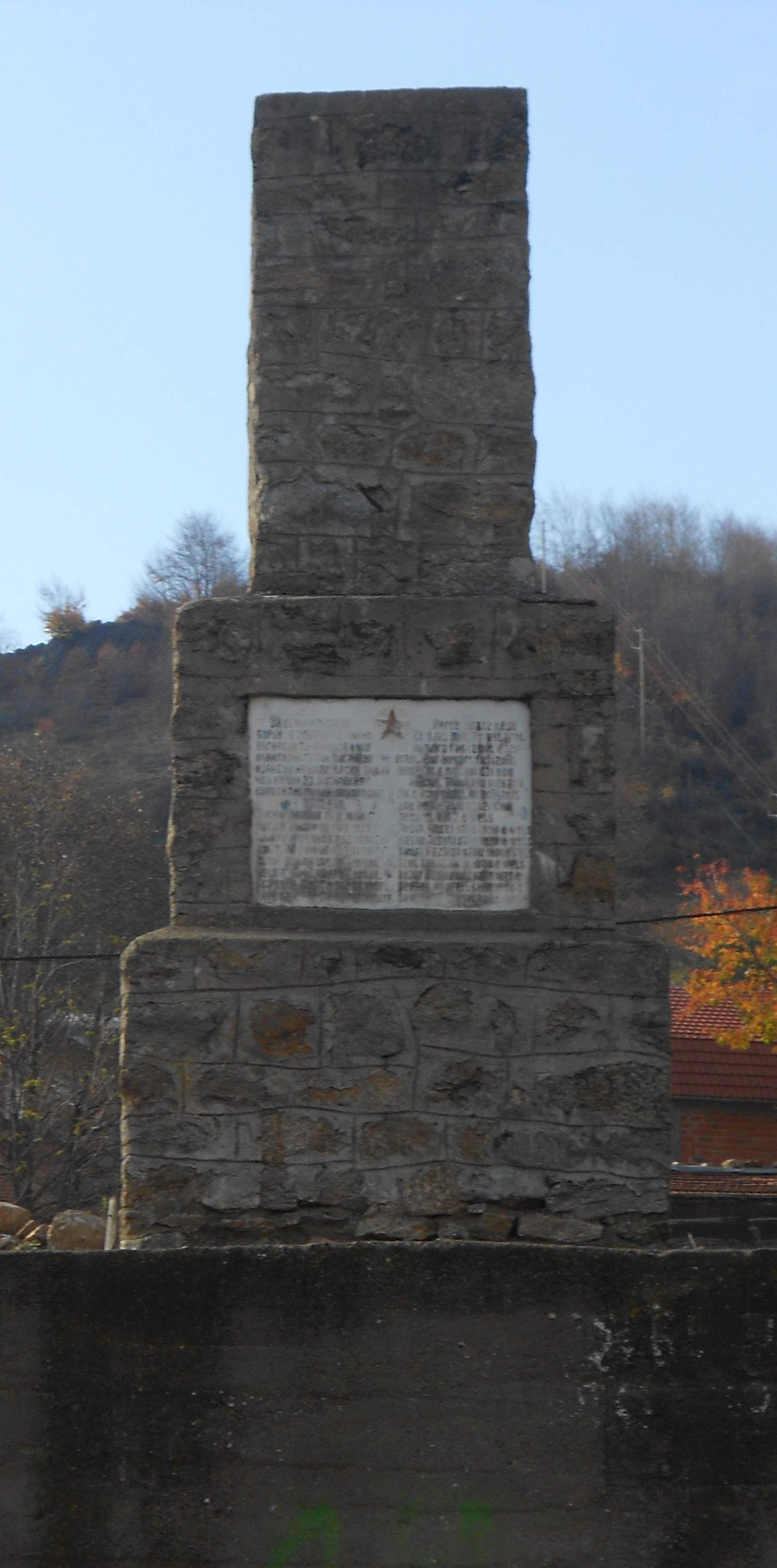 Стариот споменик во Долно Јаболчиште